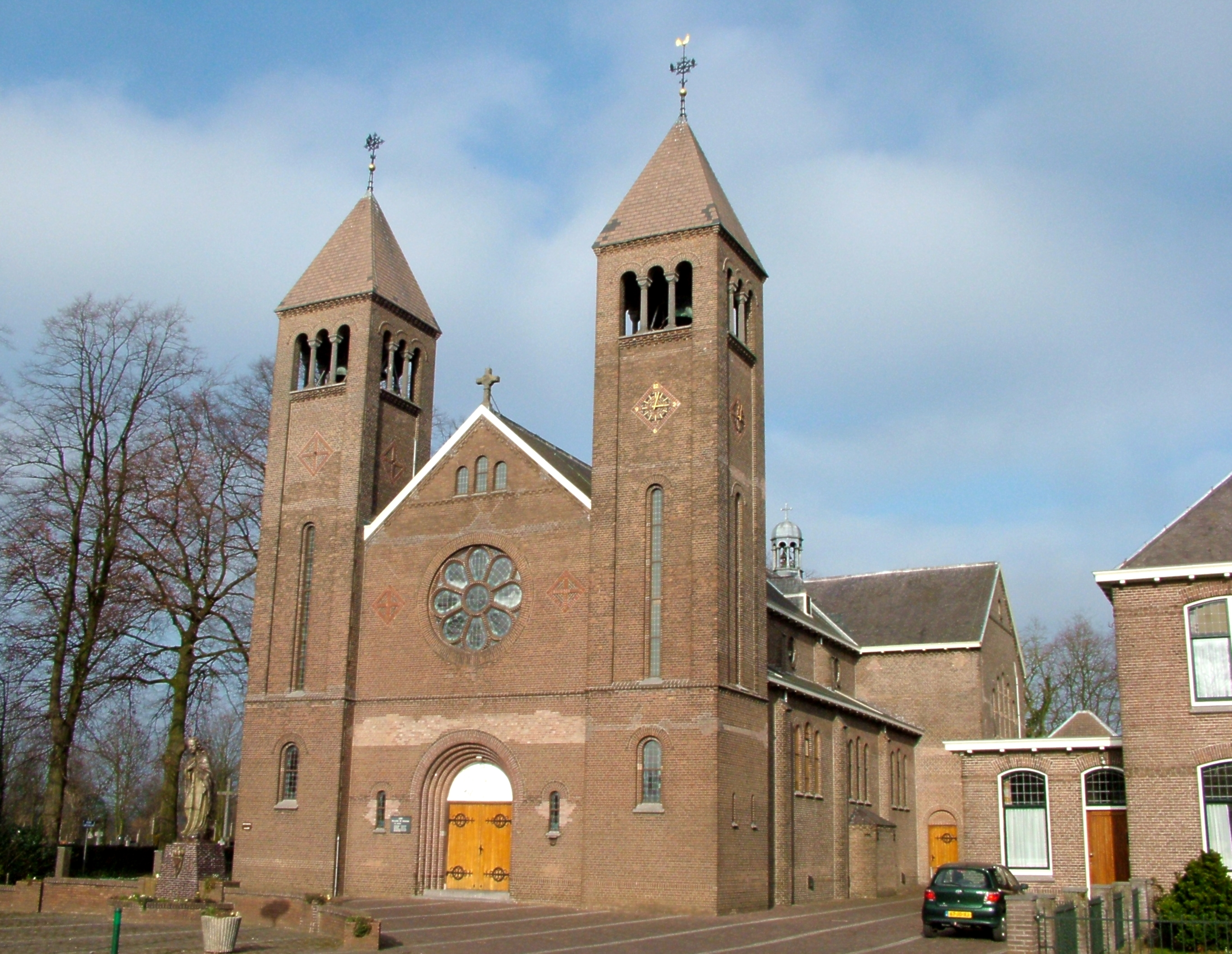 Ulft (Oude IJsselstreek), kerk der st. Antonius parochie